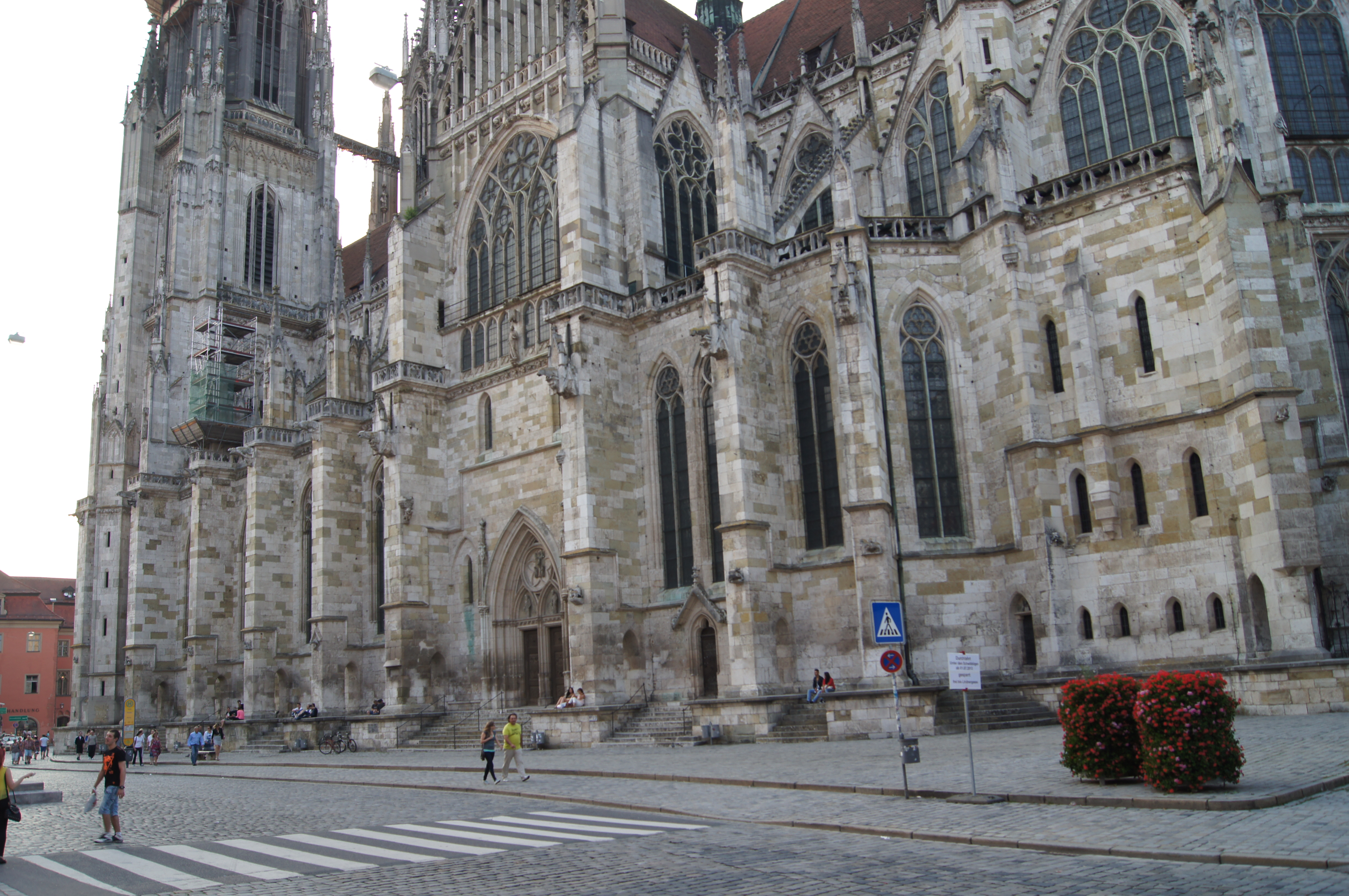 Dom in Regensburg, Bayern, Deutschland